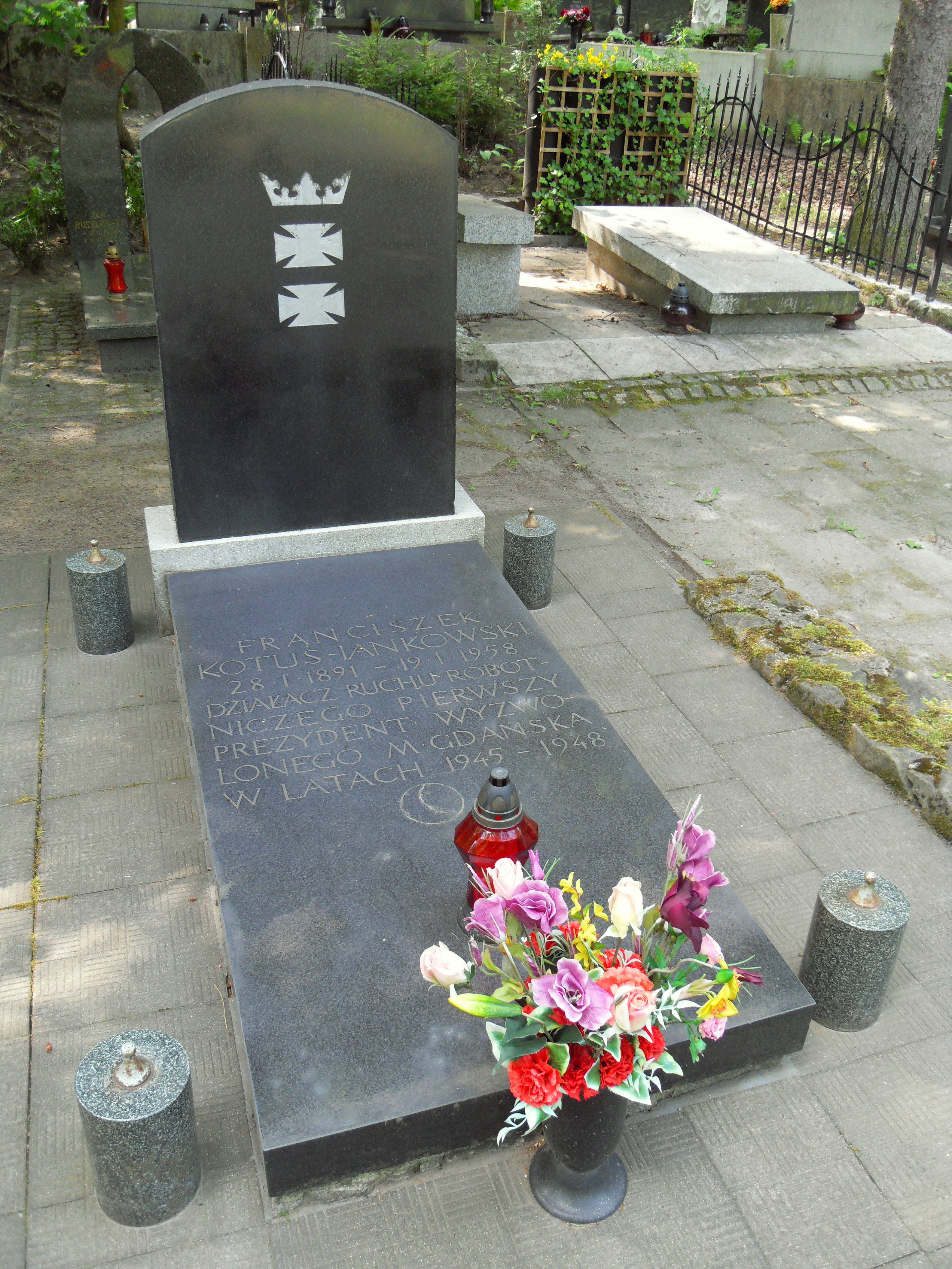 Gdańsk Wrzeszcz. Cmentarz Srebrzysko, grób Franciszka Kotusa-Jankowskiego.